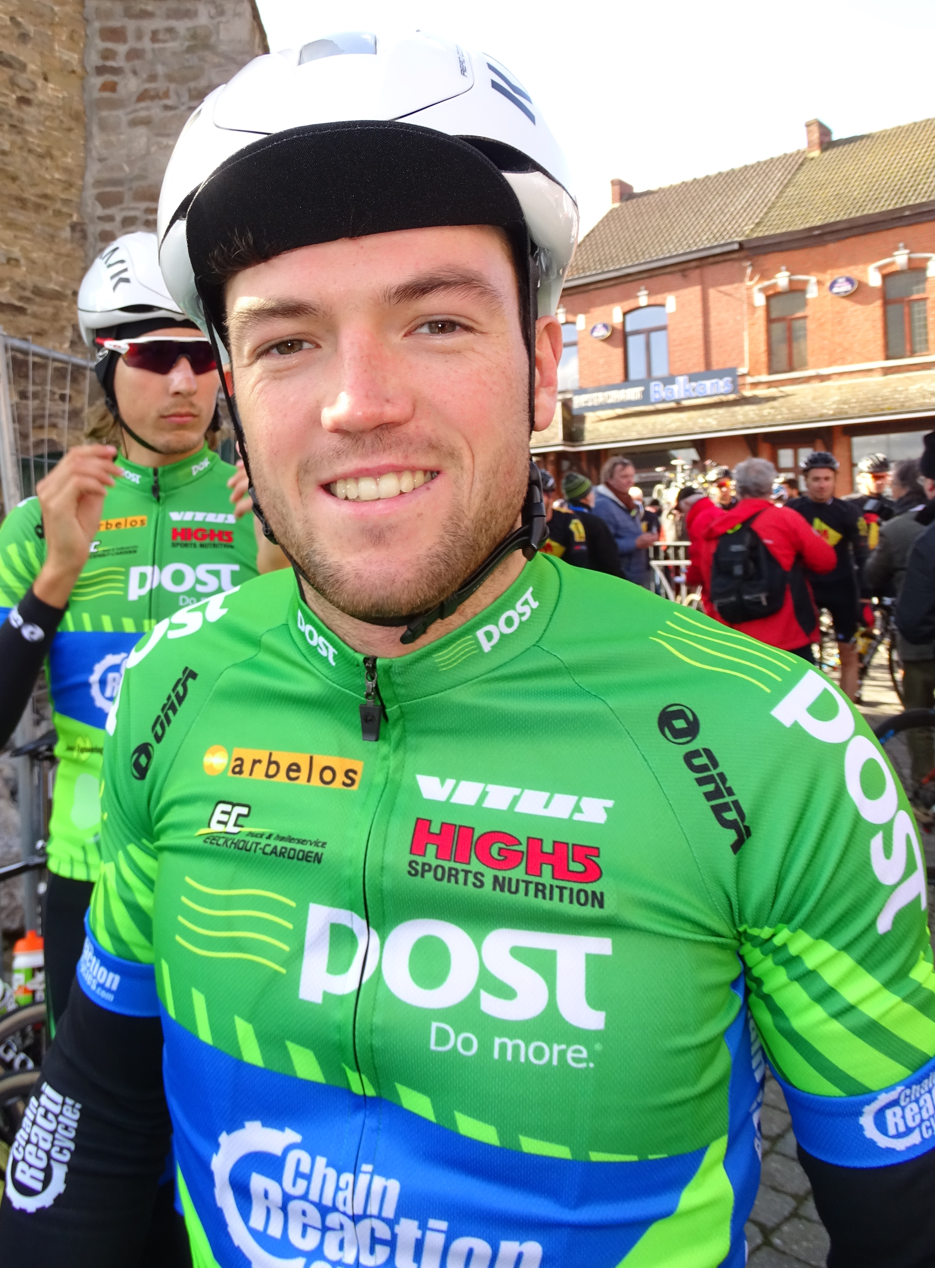 Reportage réalisé le mercredi 2 mars à l'occasion du départ du Samyn des Dames 2016 et du Samyn 2016 à Quaregnon, Belgique.